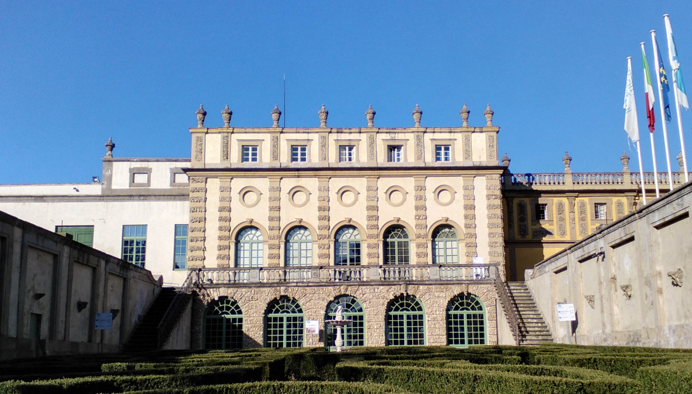 Villa Salviati, Fiesole. Sede dell'Archivio storico della Comunità europea